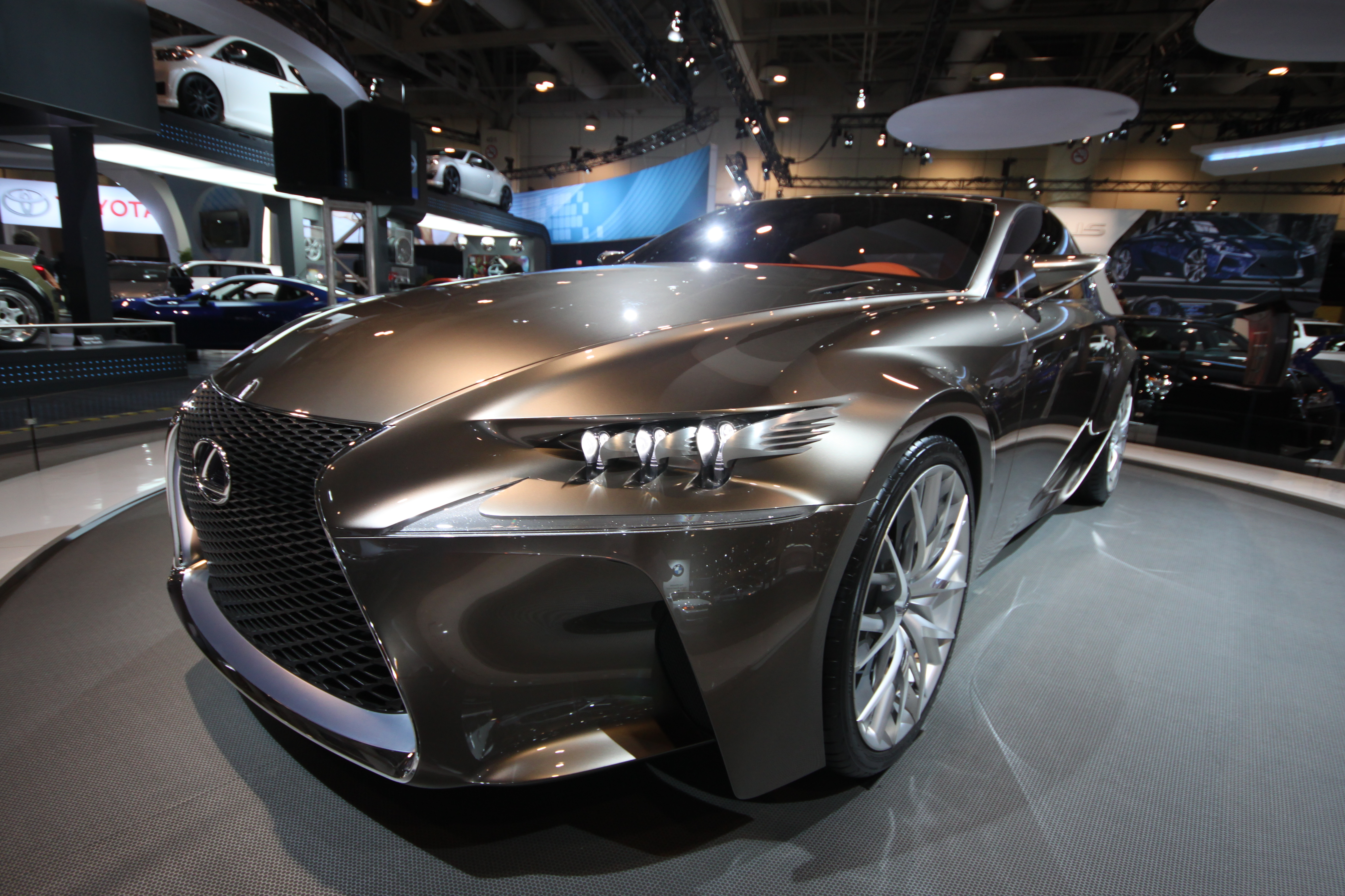 Lexus LF-CC Concept